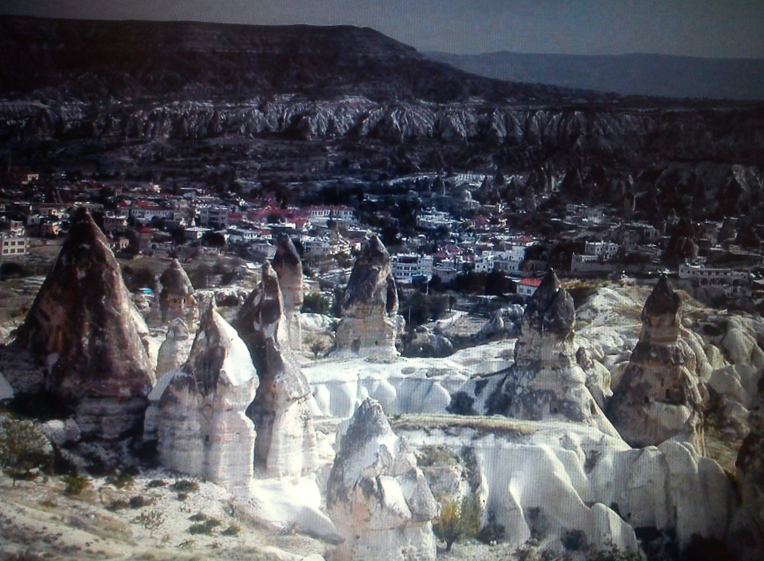 Fotografia de la region turca de Capadocia.